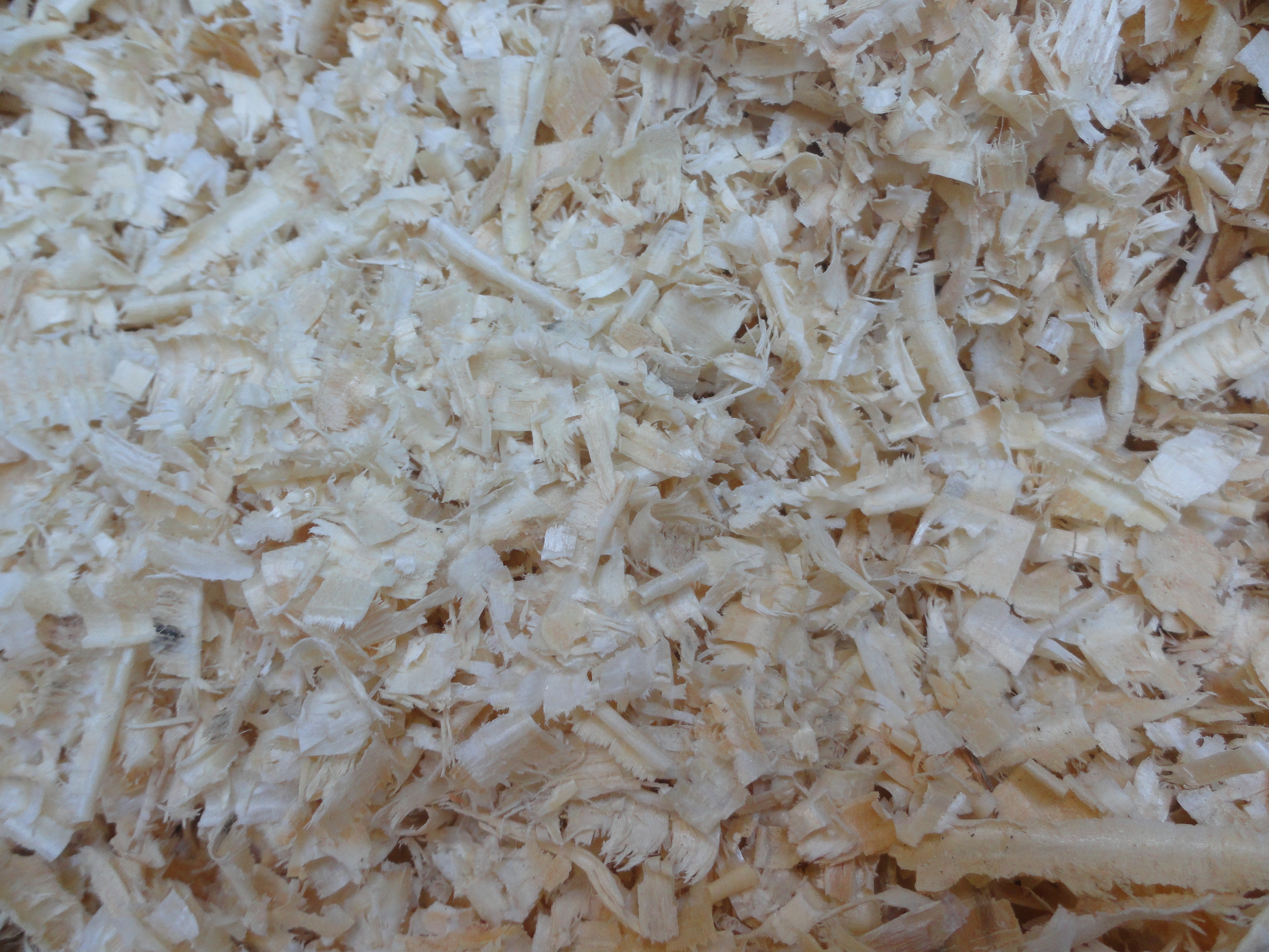 Древесная стружка строгального станка